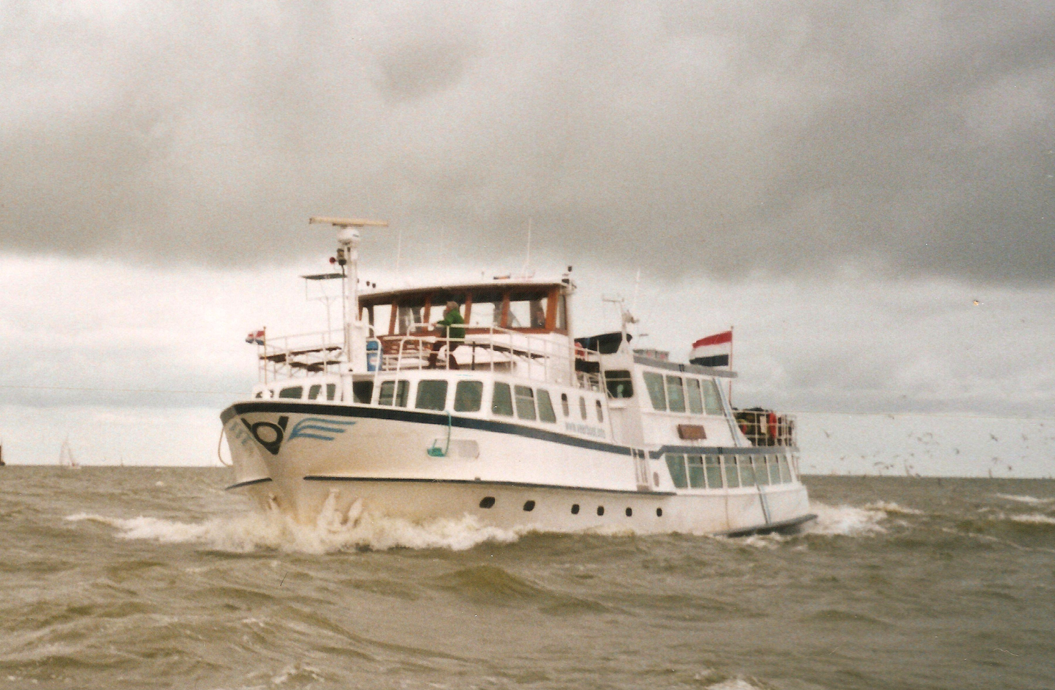 Veerboot MS Bep Glasius op het IJsselmeer ter hoogte van Stavoren